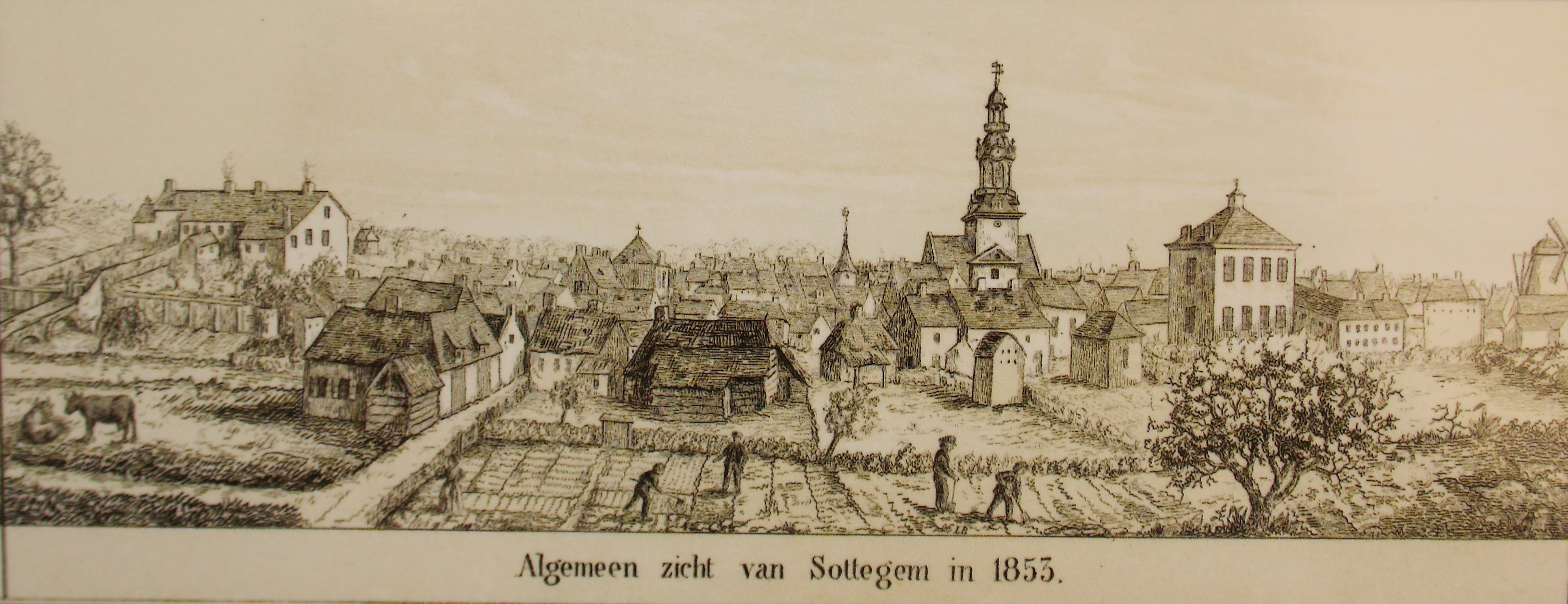 Zottegem, Vlaanderen, België (in: 'Gedenkbeelden van Lamorael van Egmond', L.J. Van Peteghem, 1853)